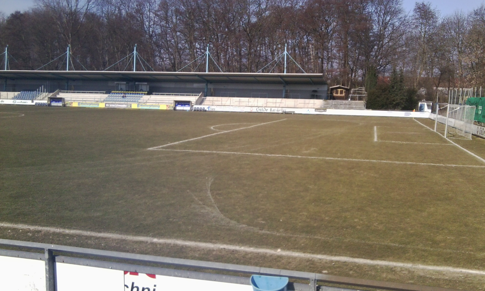 Stadion der SF Ricklingen und H96 II